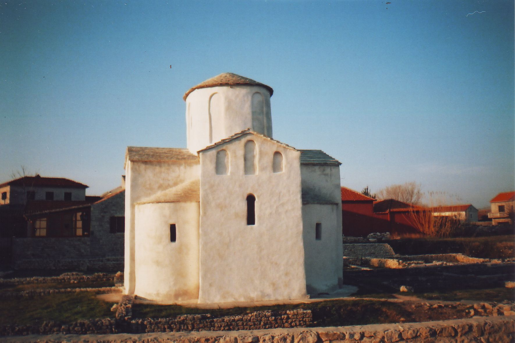 Church Sv. Kriz in Nin